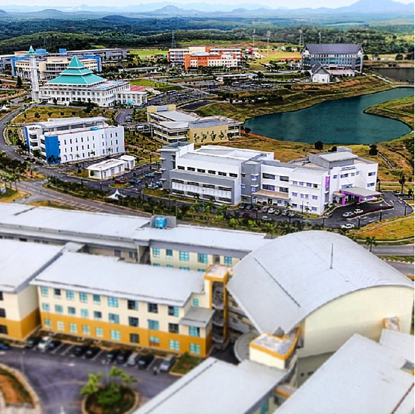 UTeM